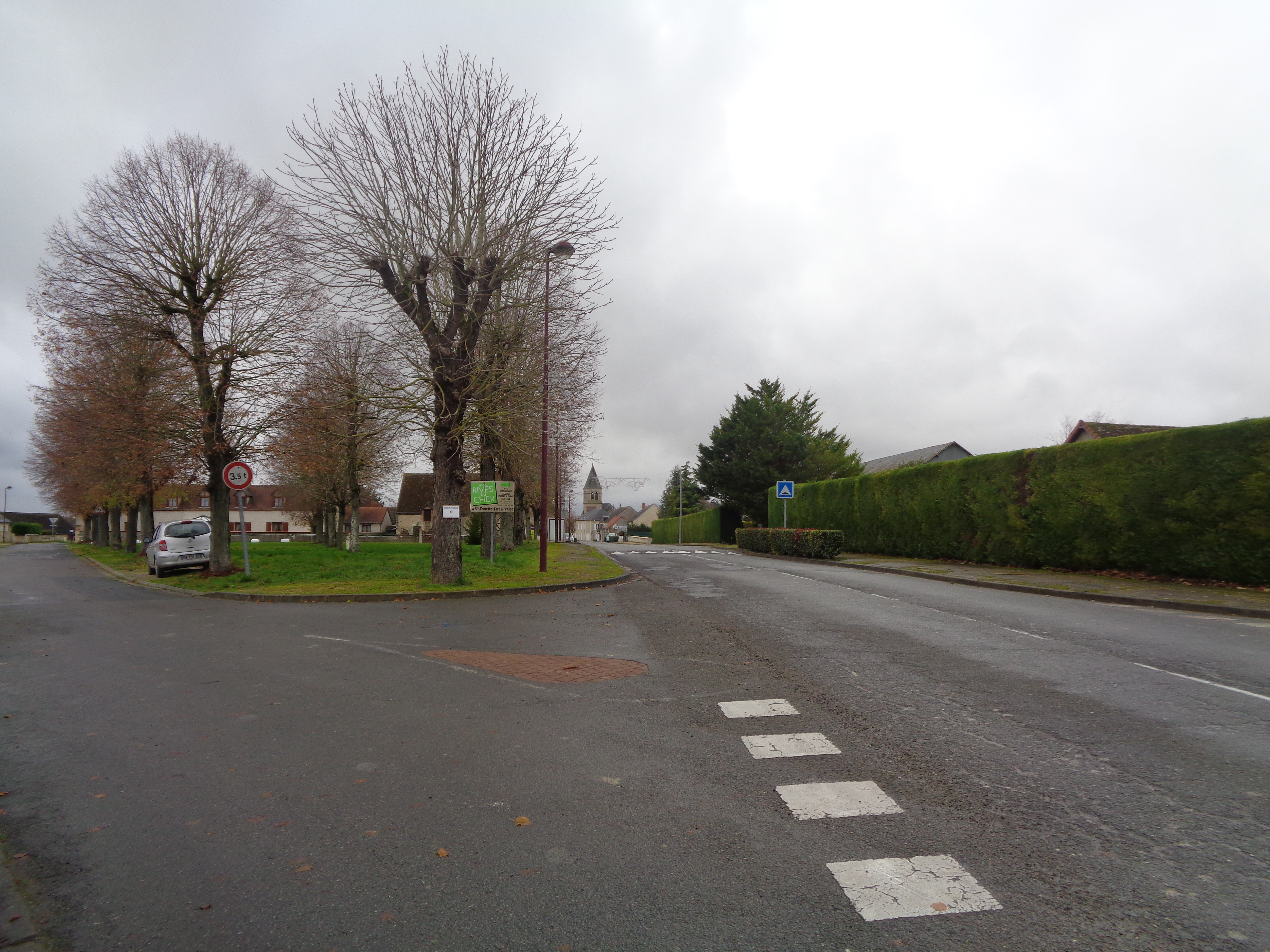 Vue d'une partie du centre de Sainte-Thorette (Cher)